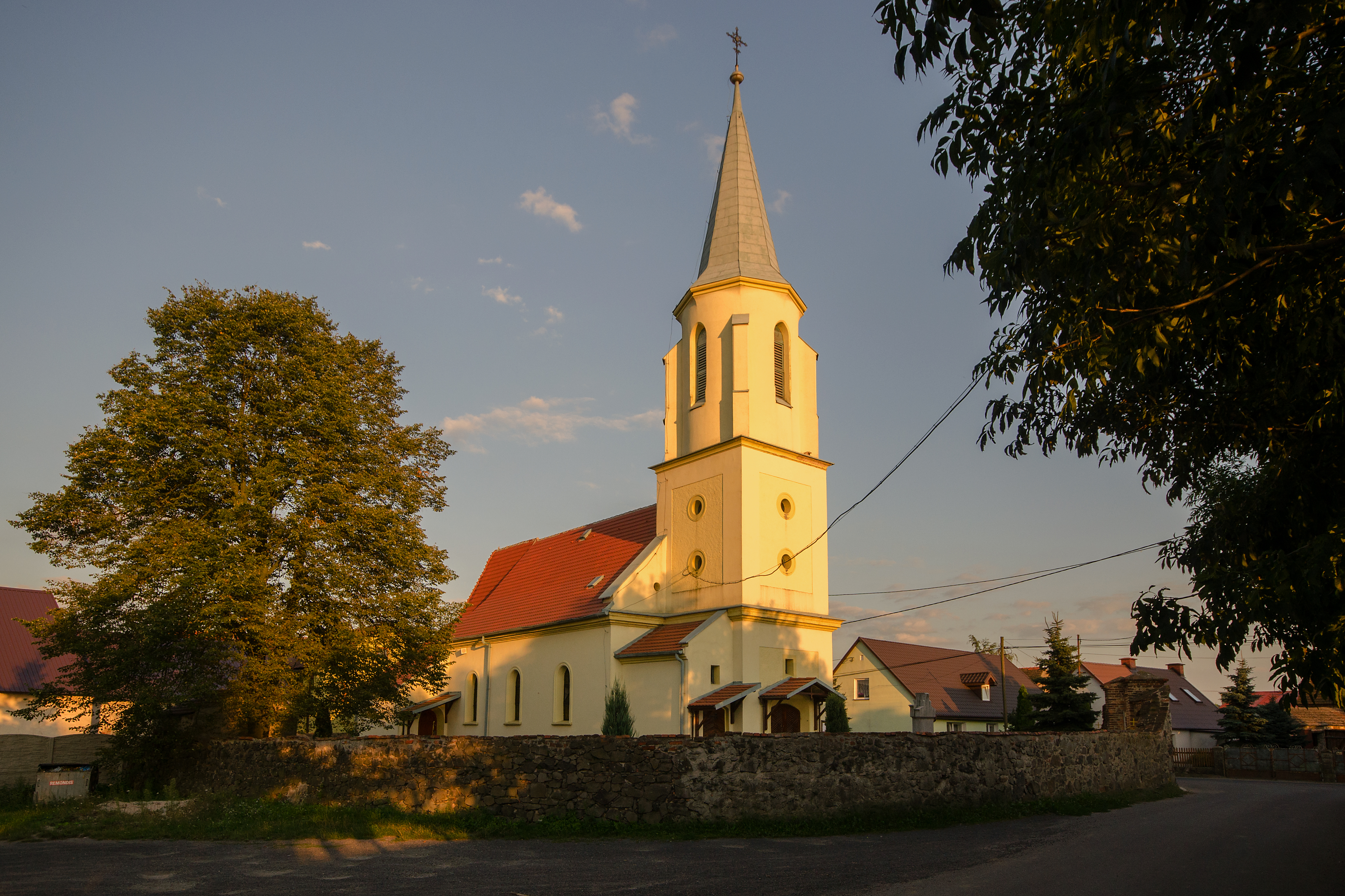 Gracze, kościół par. p.w. Św. Trójcy, 1696, 1824